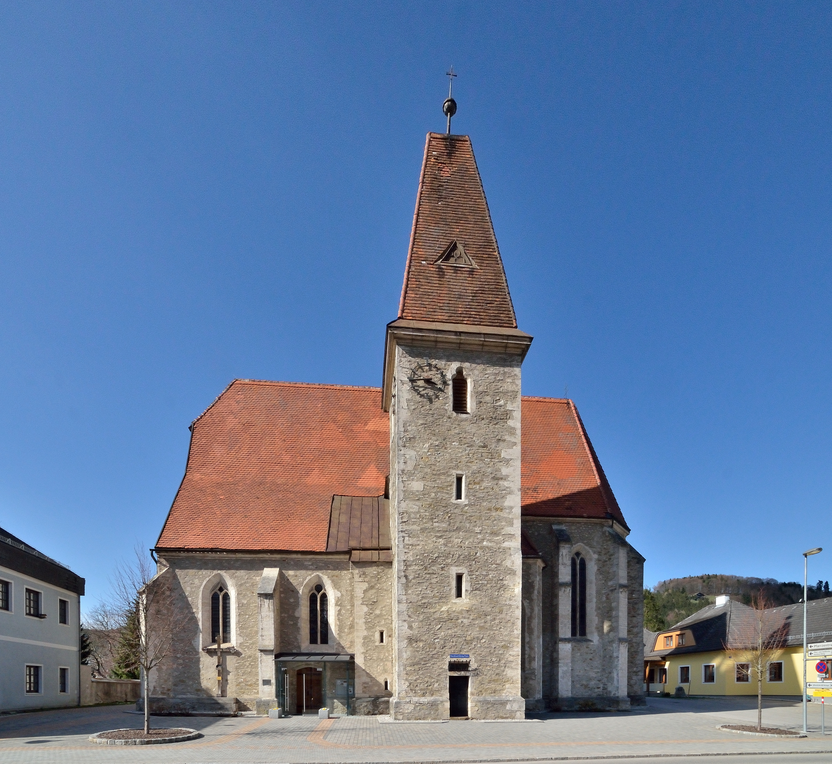 Kath. Pfarrkirche hl. Laurenz in Rabenstein an der Pielach